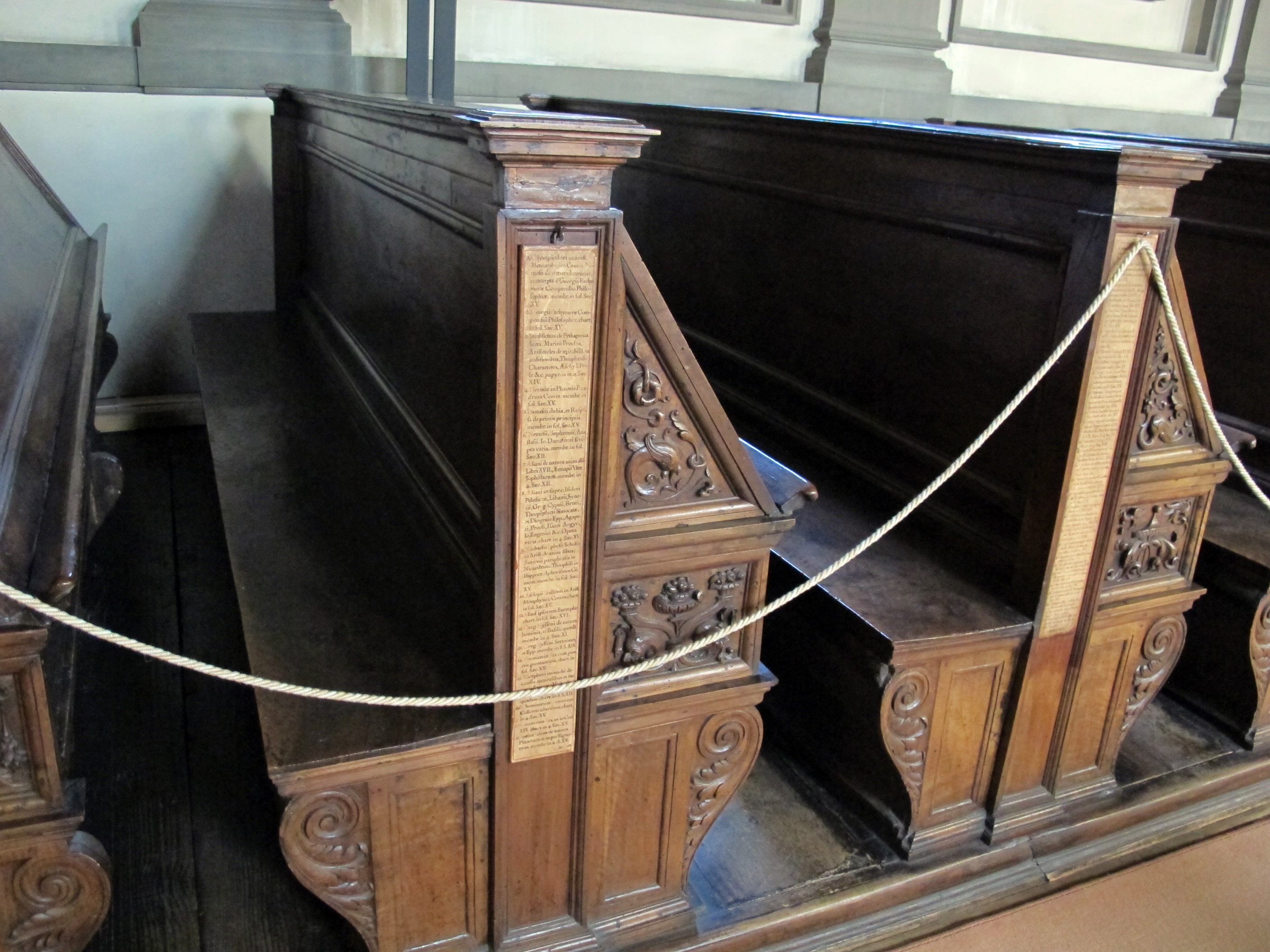 Biblioteca laurenziana, sala lettura, stalli michelangioleschi